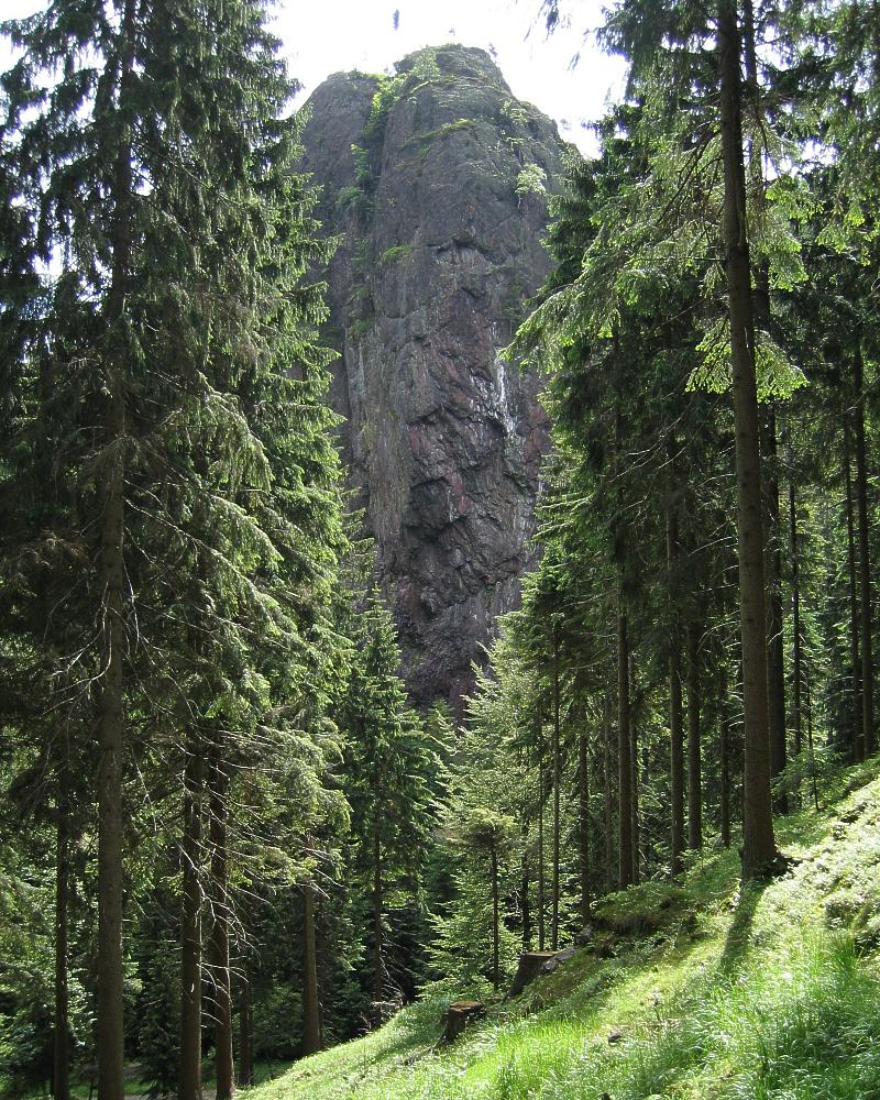 Falkenstein im Thüringer Wald bei Tambach-Dietharz